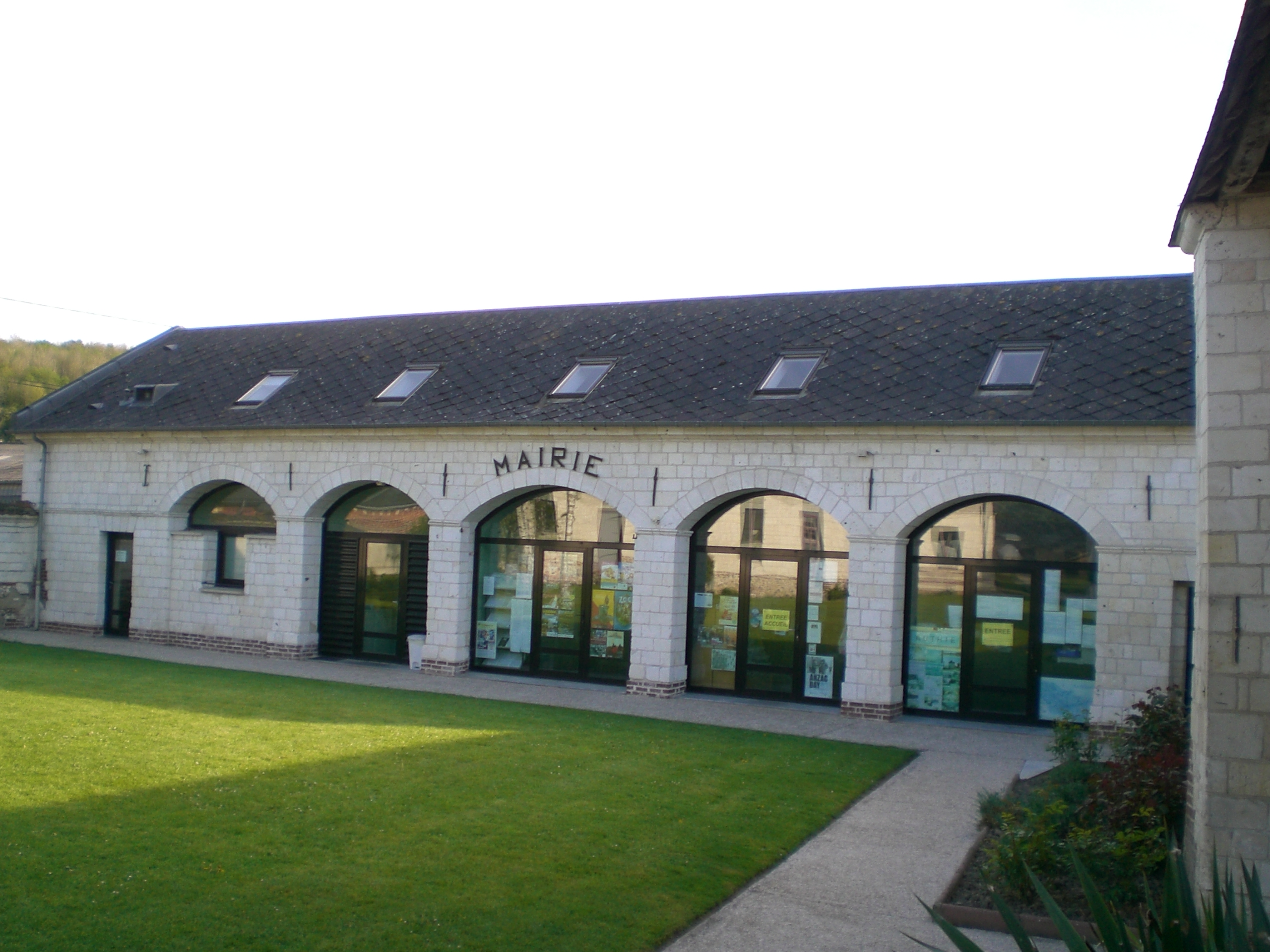 Authie (Somme) en avril 2014